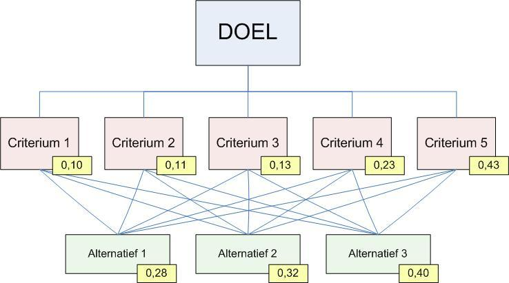 AHP keuzestructuur in VISIO inclusief cijfers